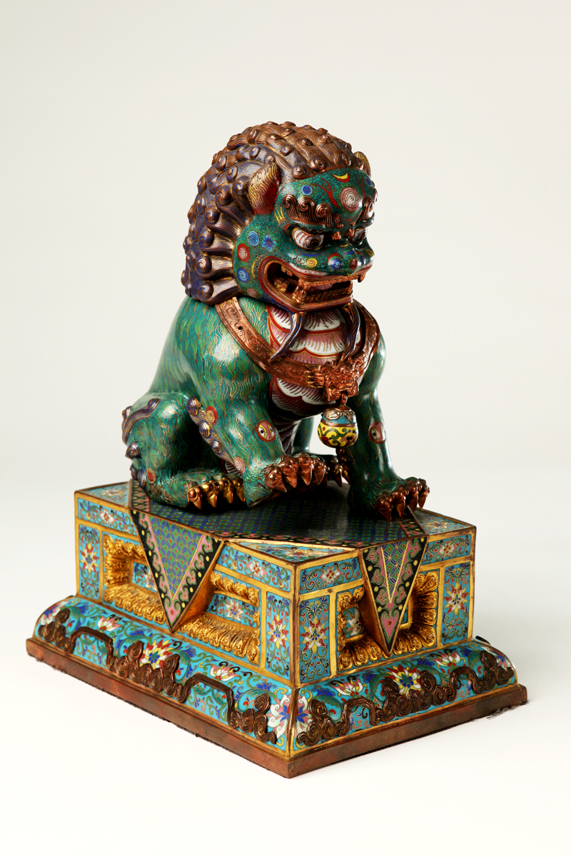 Китай